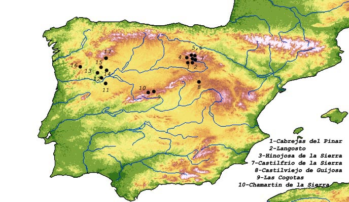 Distribucción de los castros con "chevaux de frise"